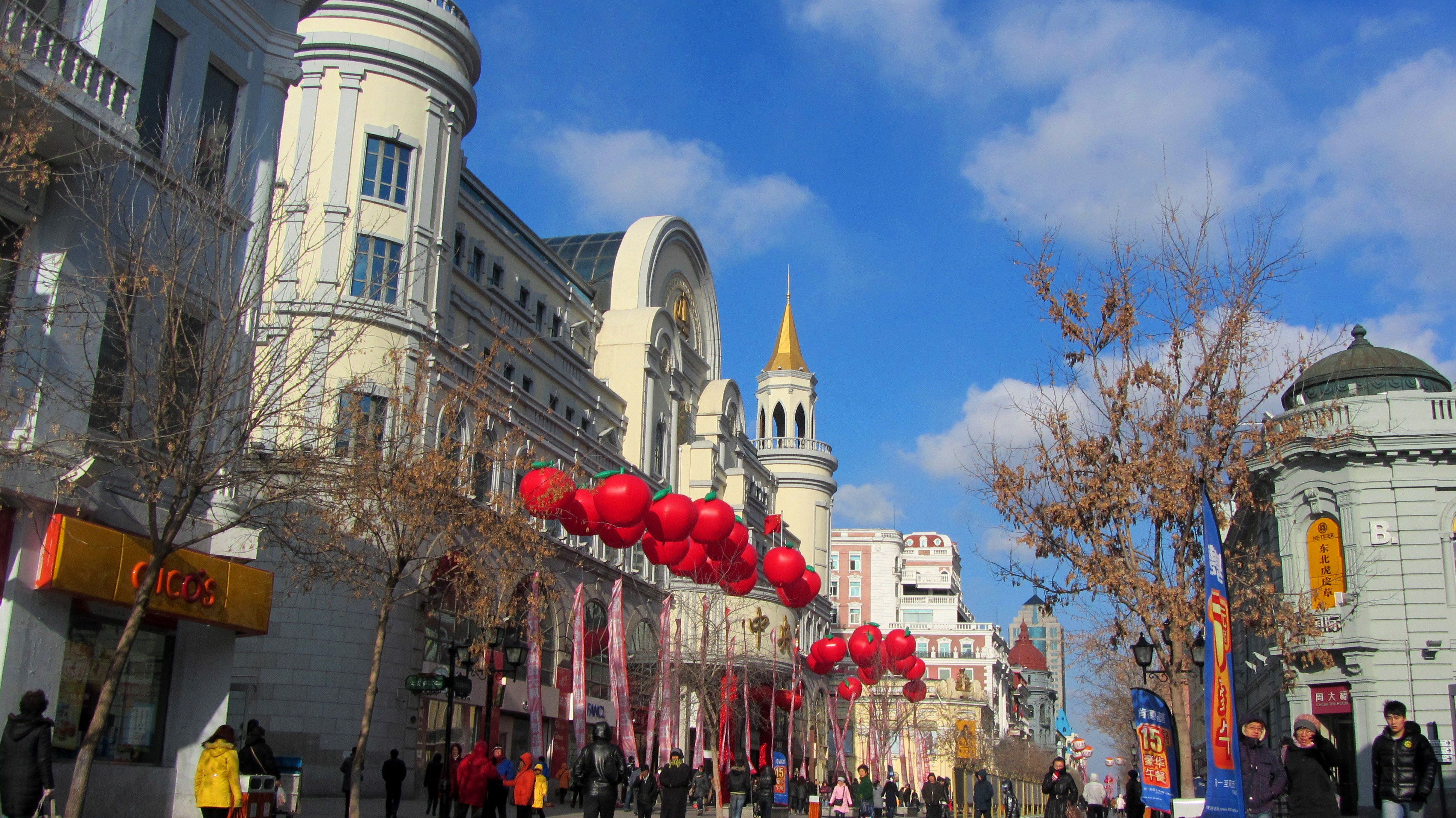 中文（中国大陆）: 黑龙江省哈尔滨市